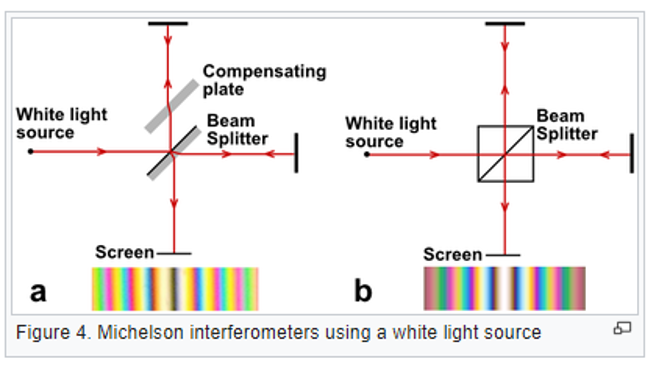 מייקלסון 5